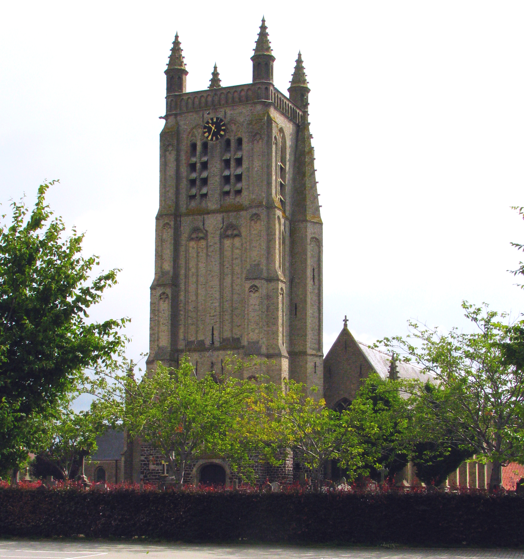 Gotische St.-Rictrudis-Kirche, Wiedererrichtung 1923, ehemals im 15. Jahrhundert erbaut. Der mächtige Turm sei stets ohne Turmspitze gewesen. Woesten Ortsteil der Gemeinde Vleteren, Westflandern Belgien - Foto Wolfgang Pehlemann IMG_1384